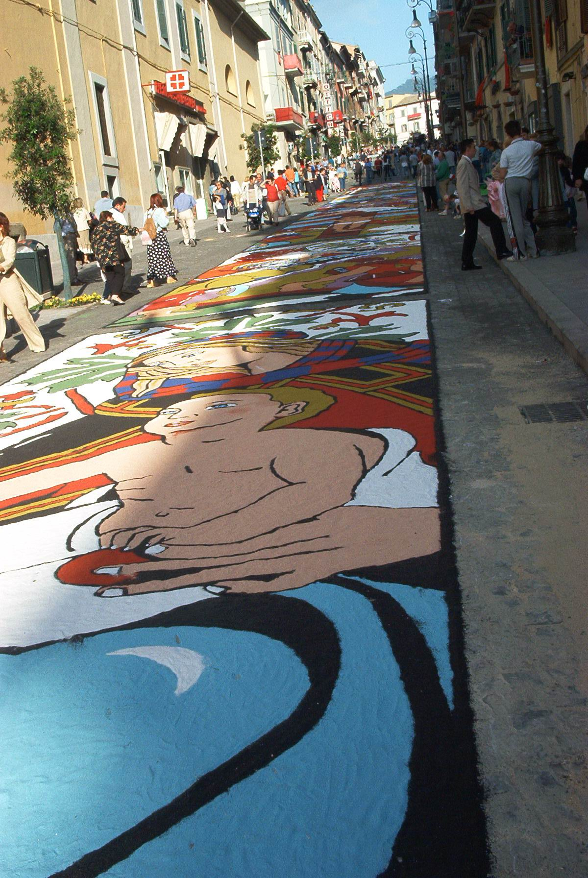 Piccola Infiorata a Marino - 11-06-2002